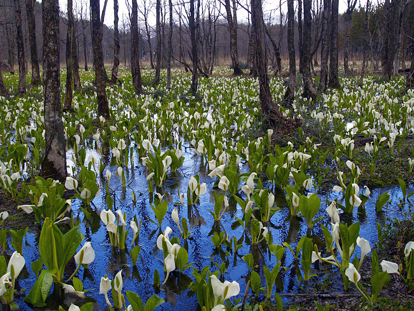 Japanese skunk cabbage